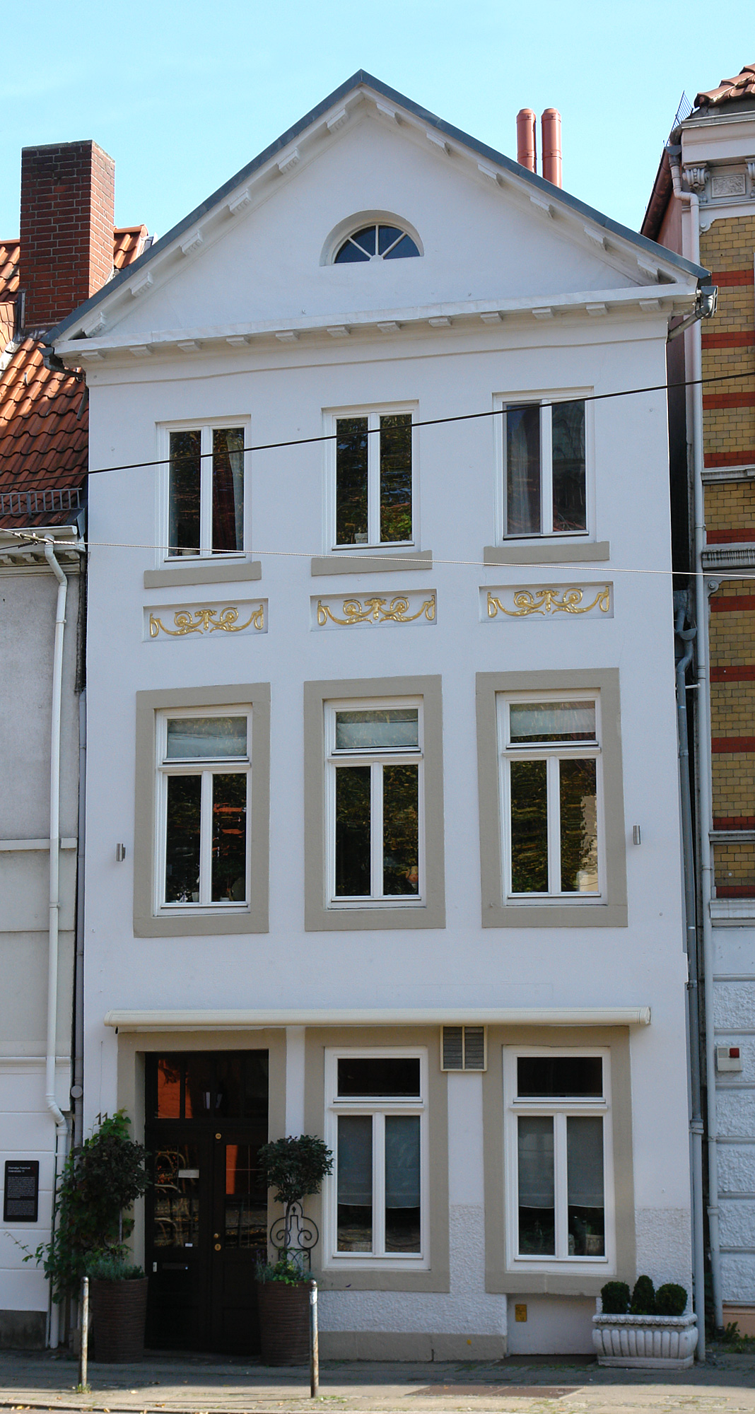 Haus Wichelhausen in Bremen, Violenstraße 11.Das abgebildete Objekt ist ein geschütztes Kulturdenkmal in der Freien Hansestadt Bremen, mit der Nr. 1188 beim Landesamt für Denkmalpflege registriert.